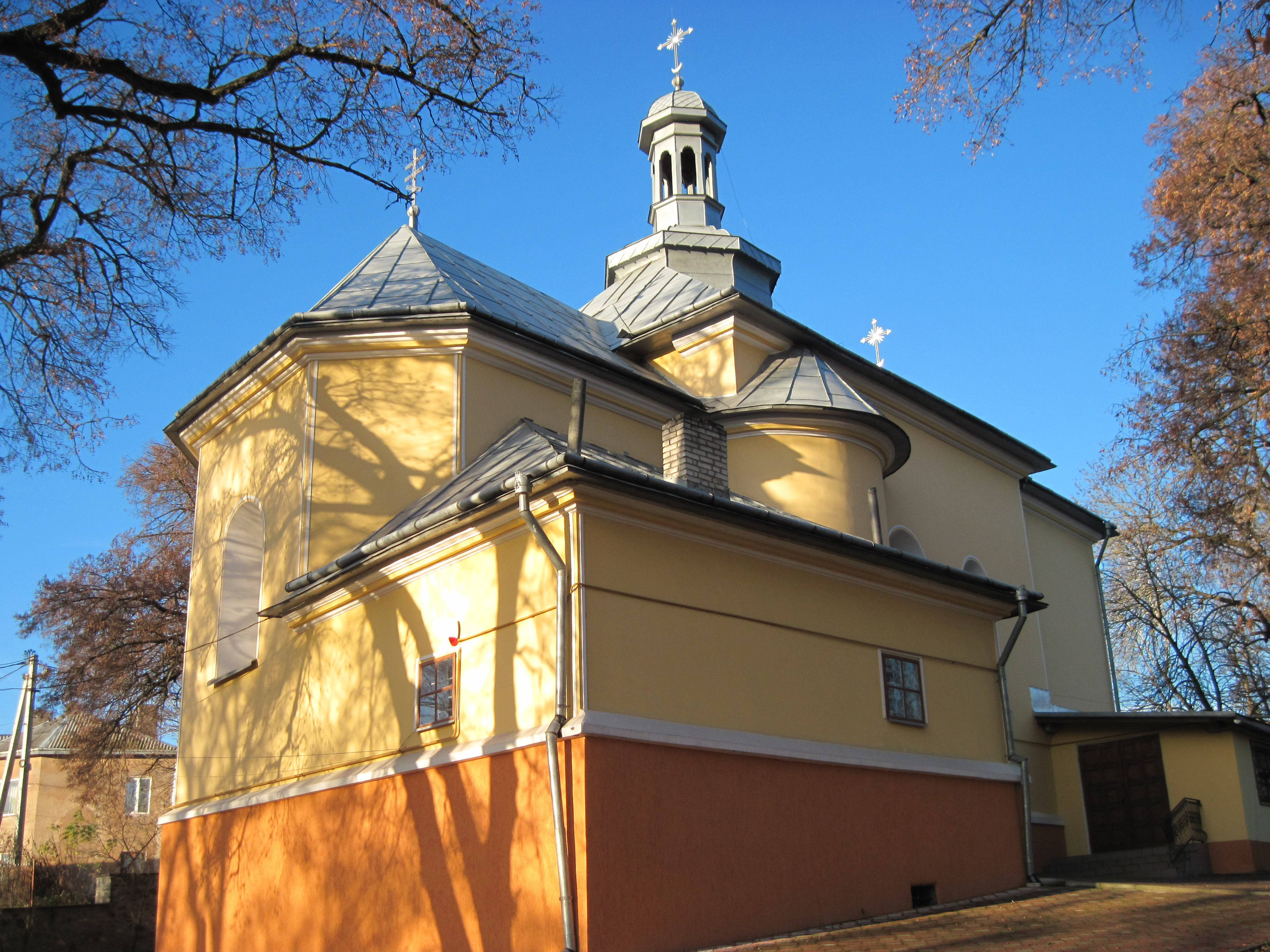 Церква Св. Миколая, Бучач. Вигляд з півд. сходу